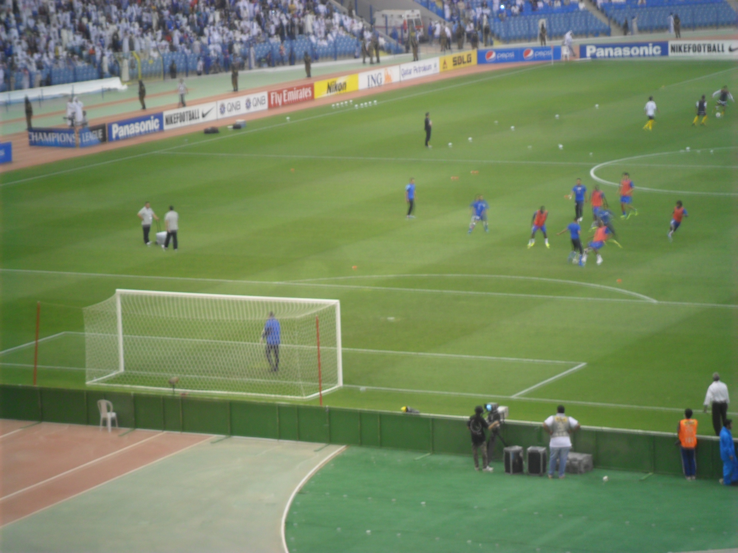 يجري لاعبو نادي الهلال السعودي عمليات الاحماء داخل ملعب الملك فهد الدولي بالرياض ، قبل بداية المباراة بدقائق ، وكان ذلك في الجولة السادسة والأخيرة من دوري المجموعات لدوري أبطال آسيا 2014 بالعاصمة السعودية الرياض